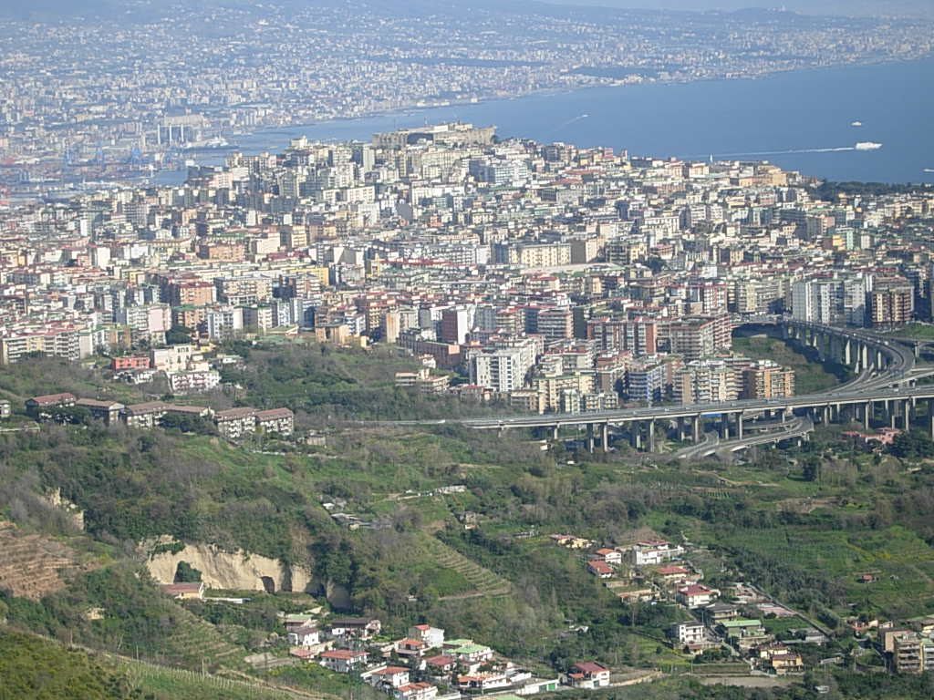 Veduta della collina del Vomero in Napoli.